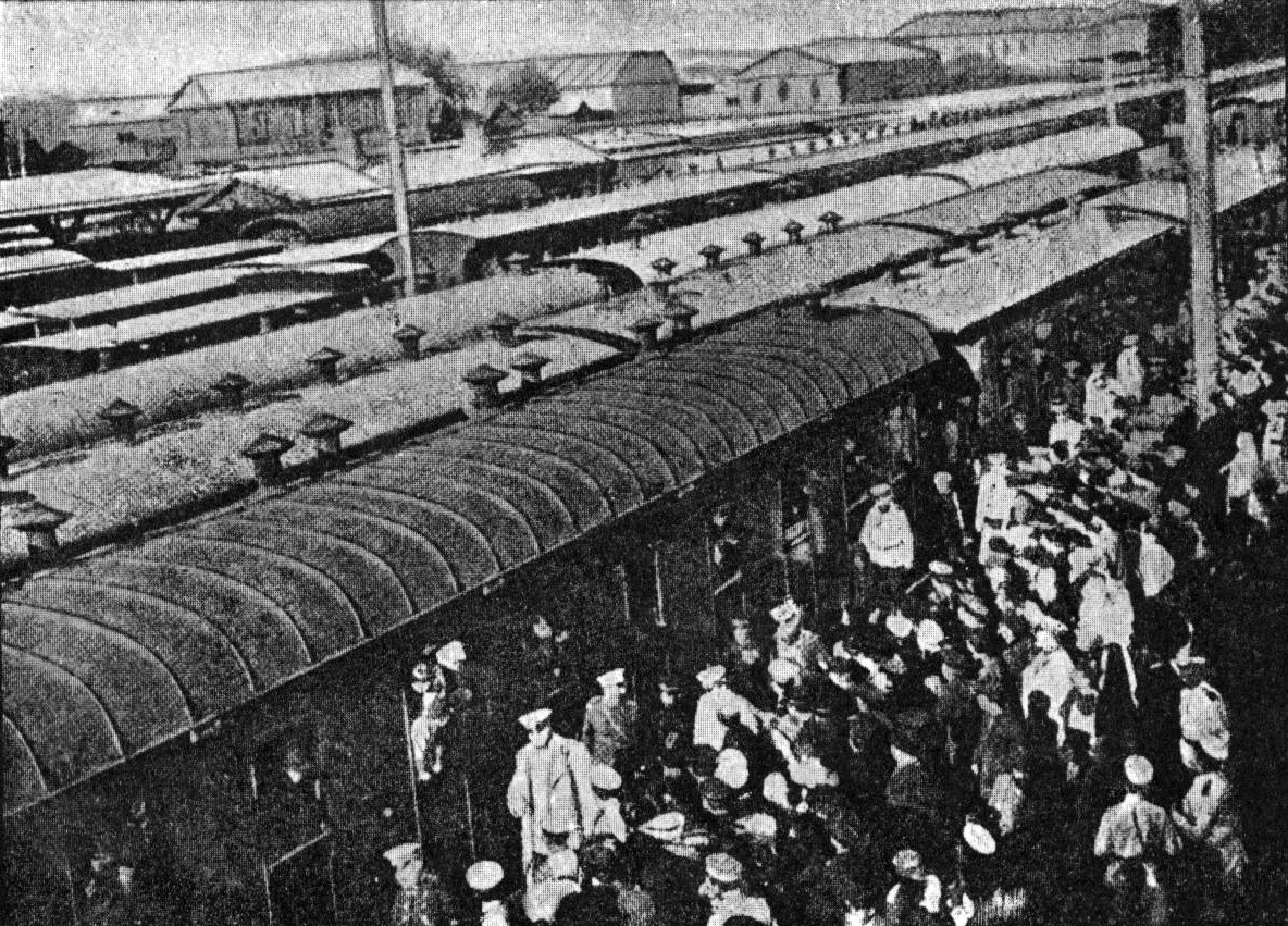 Прибытие пленных японцев в Москву в 1904 году. На дебаркадере Казанского вокзала